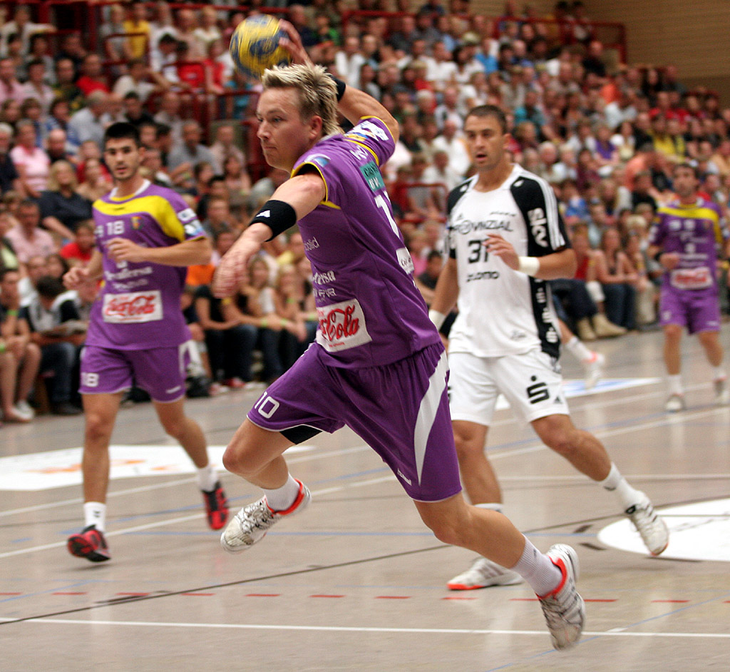 Håvard Tvedten, norwegischer Handballspieler bei BM Valladolid, am 30. August 2008 beim Schlecker Cup